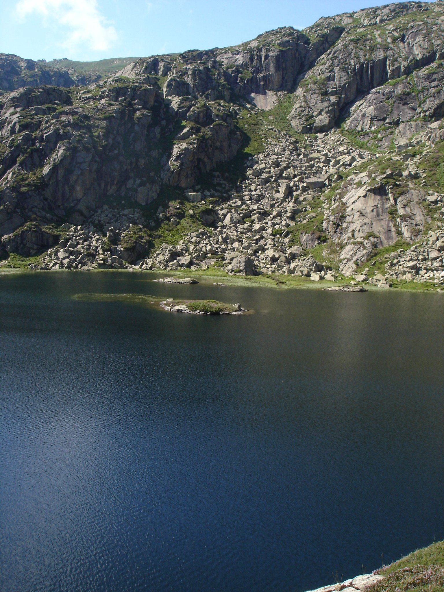 Etang d'Arbu, Ariège, France.